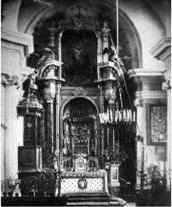 Սուրբ Նիկողայոս եկեղեցի (Կամենեց-Պոդոլսկ), ներքին տեսք